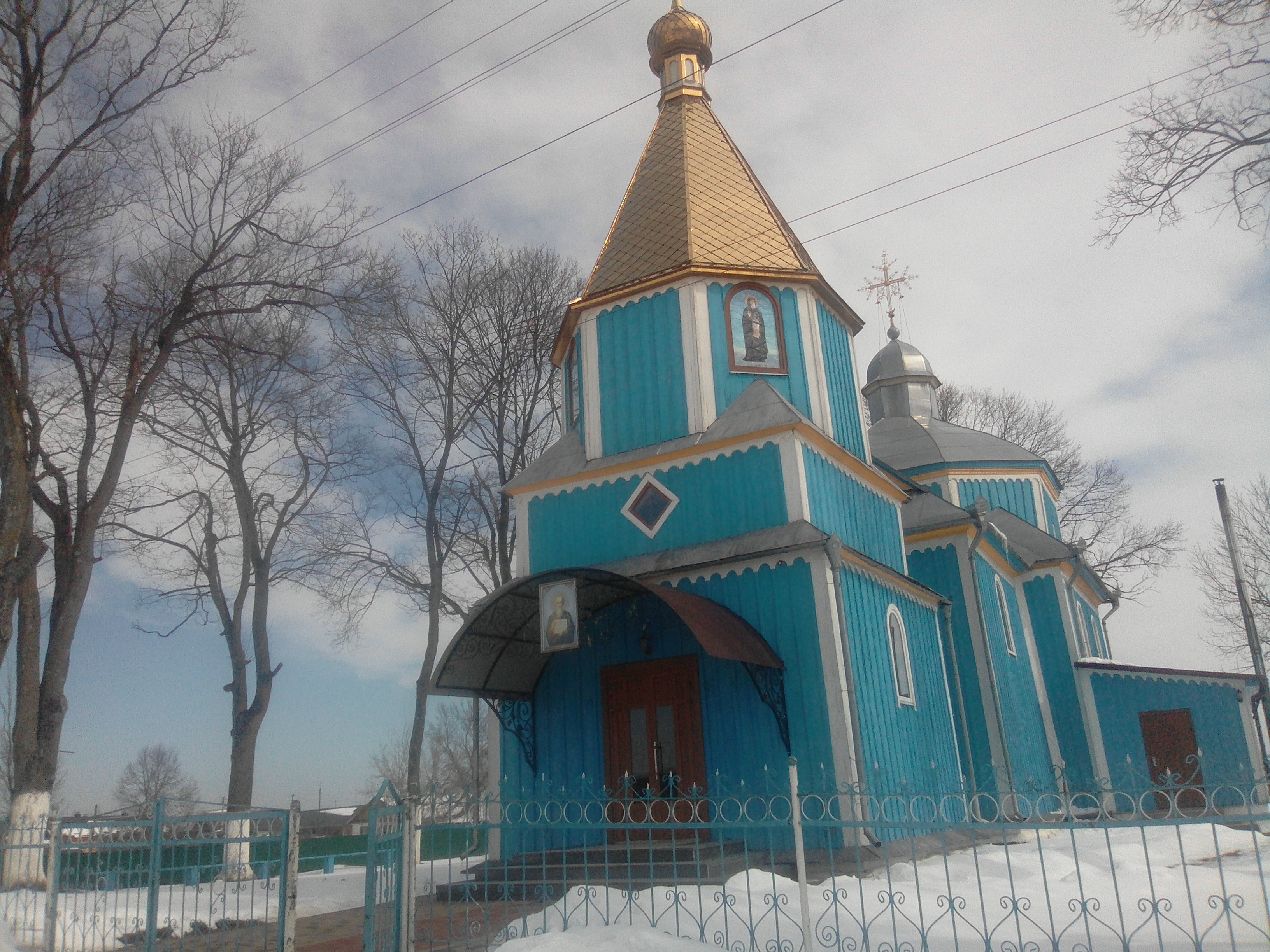 Храм Іоанна Богослова. Бокова сторона